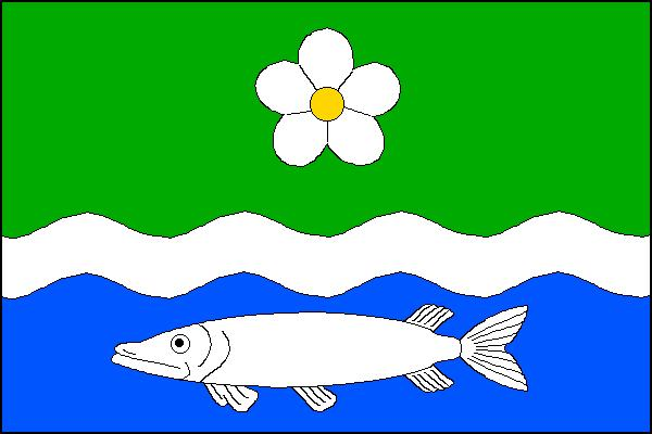 Vlajka obce Tetčice